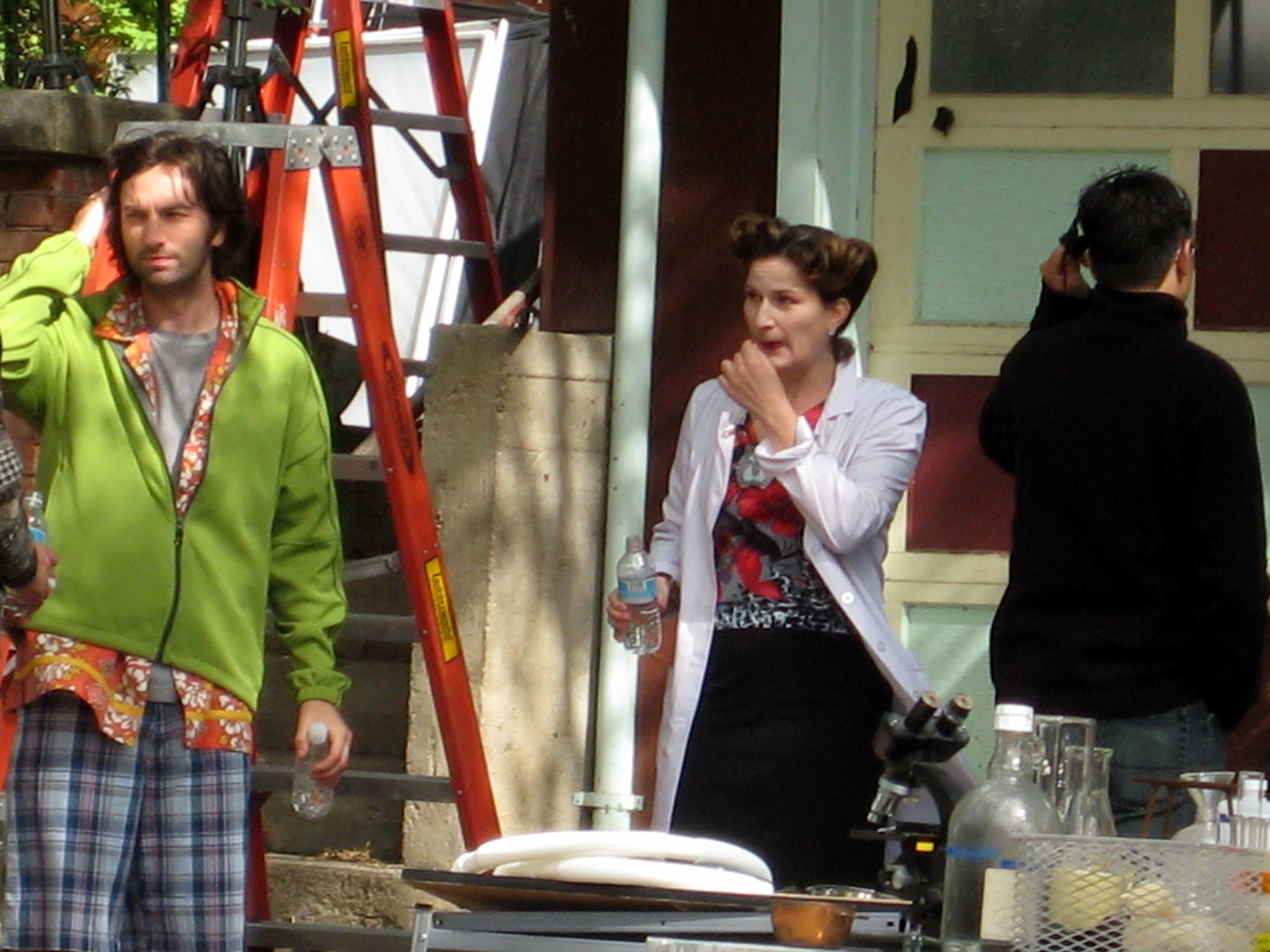 Ana Gasteyer